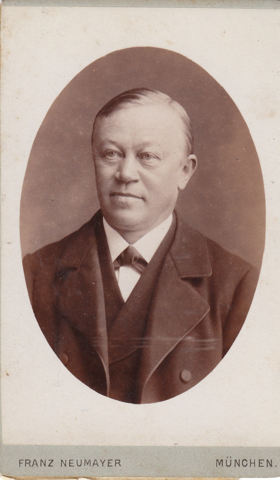 Professor Max Heilmaier 1916